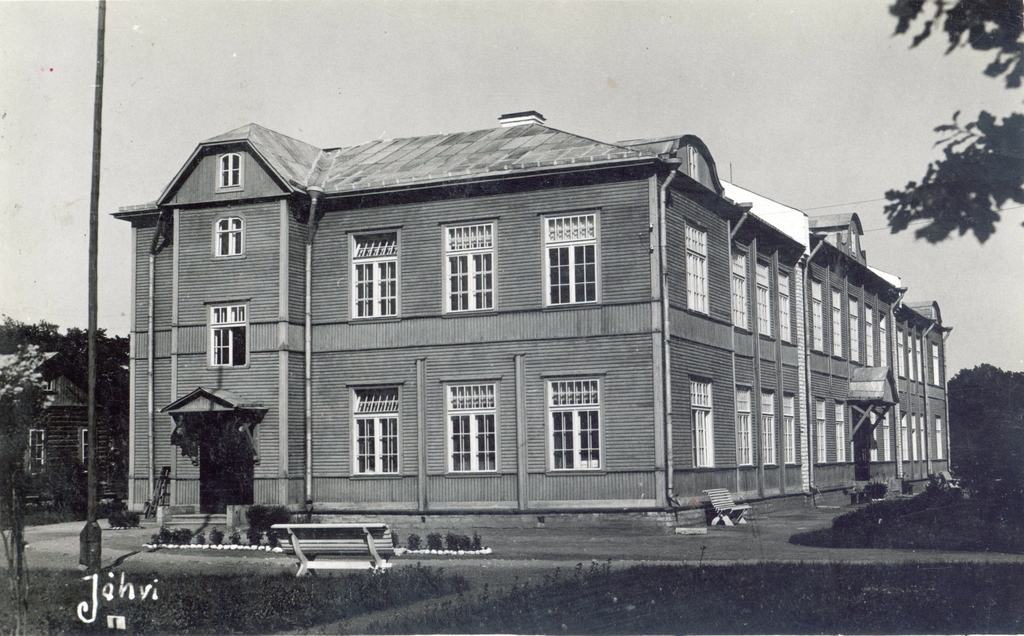 Jõhvi ühisgümnaasjumi hoone.